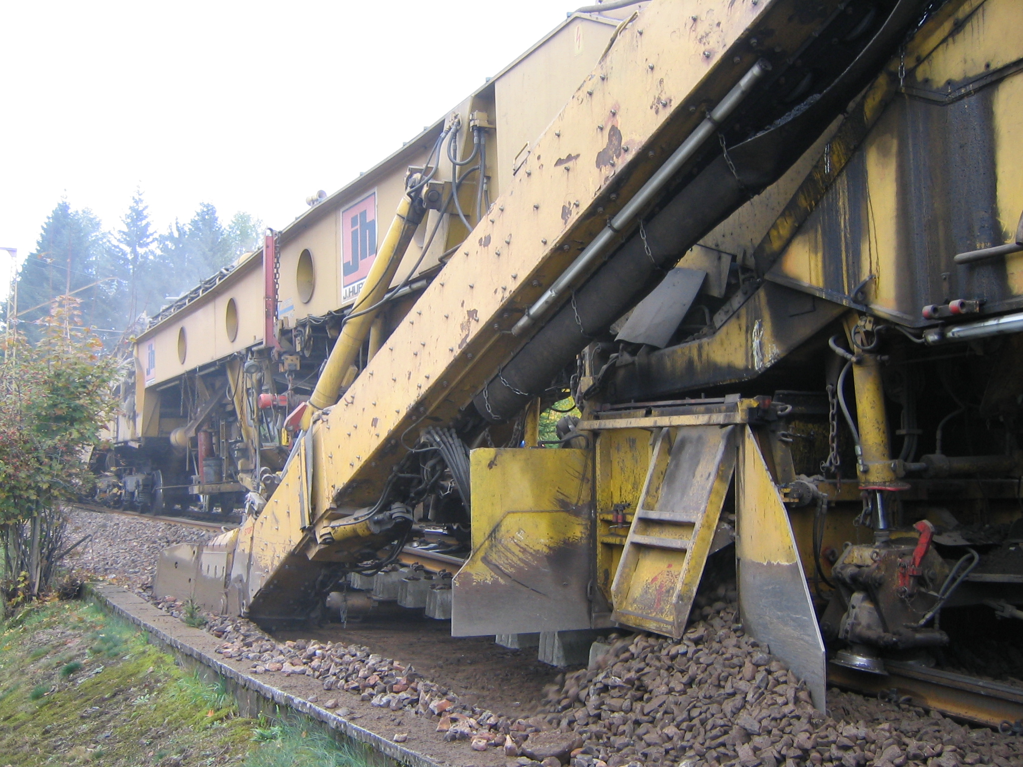 Hubert RM 800 - Hochleistungsbettungsreinigungsmaschine für Gleise im Einsatz kurz vor dem deutschen Bahnhof Titisee